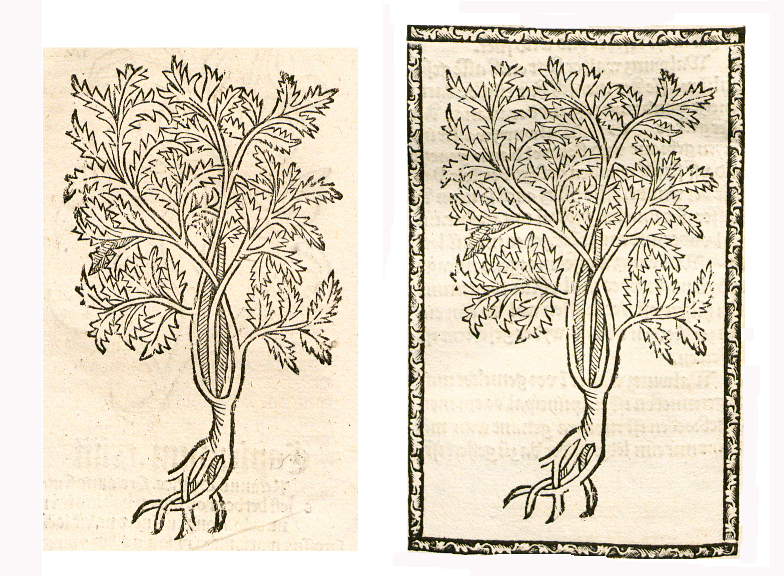 Abbildung von: Wunt Scherling (Conium maculatum)